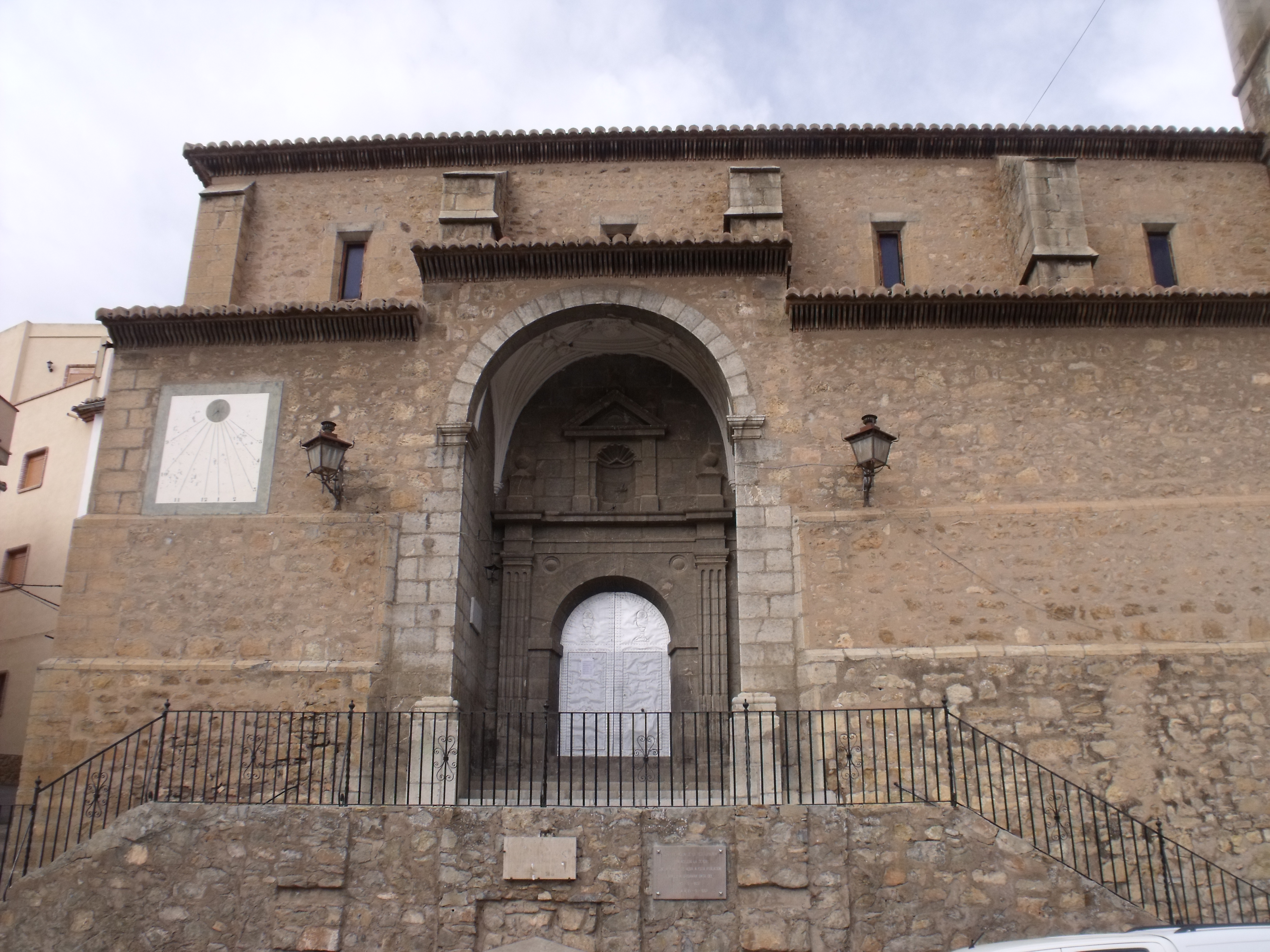 Iglesia parroquial